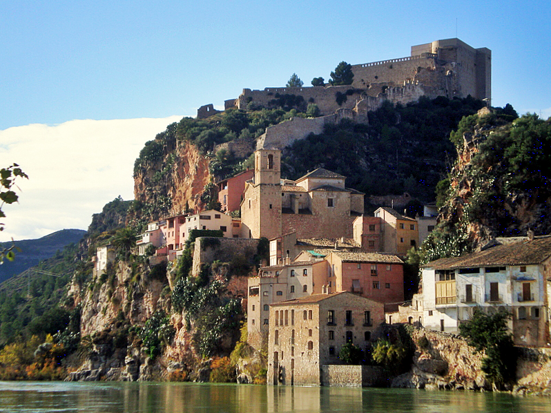 MIRAVET -- El poble antic amb el castell. Les primeres restes trobades en el lloc que ocupa el castell daten del segle II aC, d´un establiment iber. Els vestigis més antics del castell andalusí daten del segle XI. Entre finals del segle XI i principis del XII la fortalesa fou reformada i ampliada, probablement per protegir la frontera d´Al-Andalus de la pressió militar dels comtes catalans. Són d´aquest període part de les construccions del recinte sobirà i les muralles. A la segona meitat del segle XII i durant el segle XIII es produeix una nova etapa constructiva arran de la conquesta de Tortosa i el seu territori per part del comte Ramon Berenguer IV en el procés d´expansió territorial catalana. Entre 1151 i el 1153, Miravet i Siurana, els darrers reductes musulmans, són conquerits pels senyor feudals. Ramon Berenguer IV dóna el castell de Miravet i les terres adjacents a l´orde del Temple. Els templers transformen el castell andalusí en fortalesa templera: entre la segona meitat del segle XII i el segle XIII es construeix el bloc principal del recinte superior, on hi ha l´església, l´ala del refetor i part de les muralles.